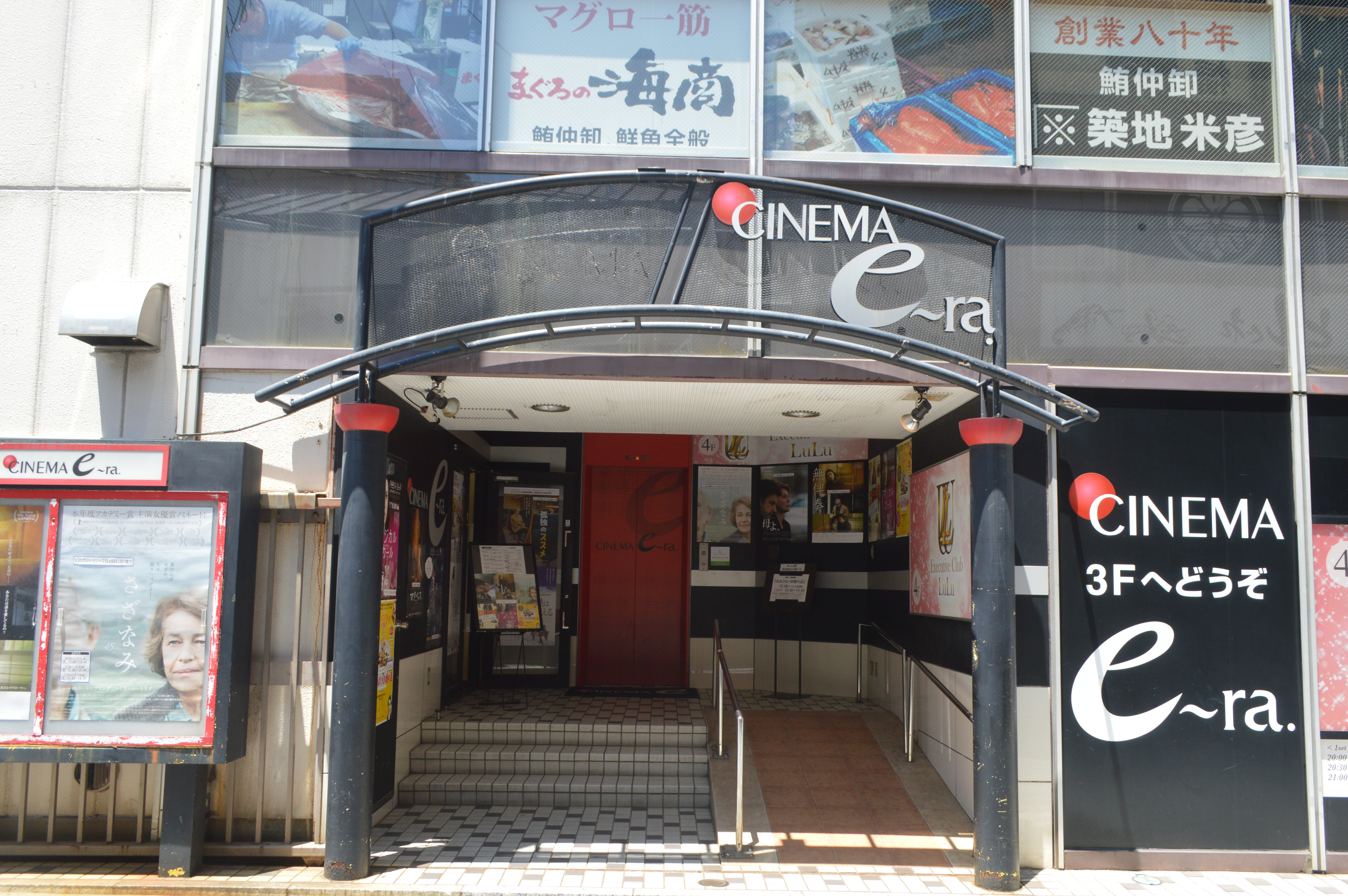 浜松市の中心市街地である田町にある笠井屋ビル。シネマイーラが入っている。